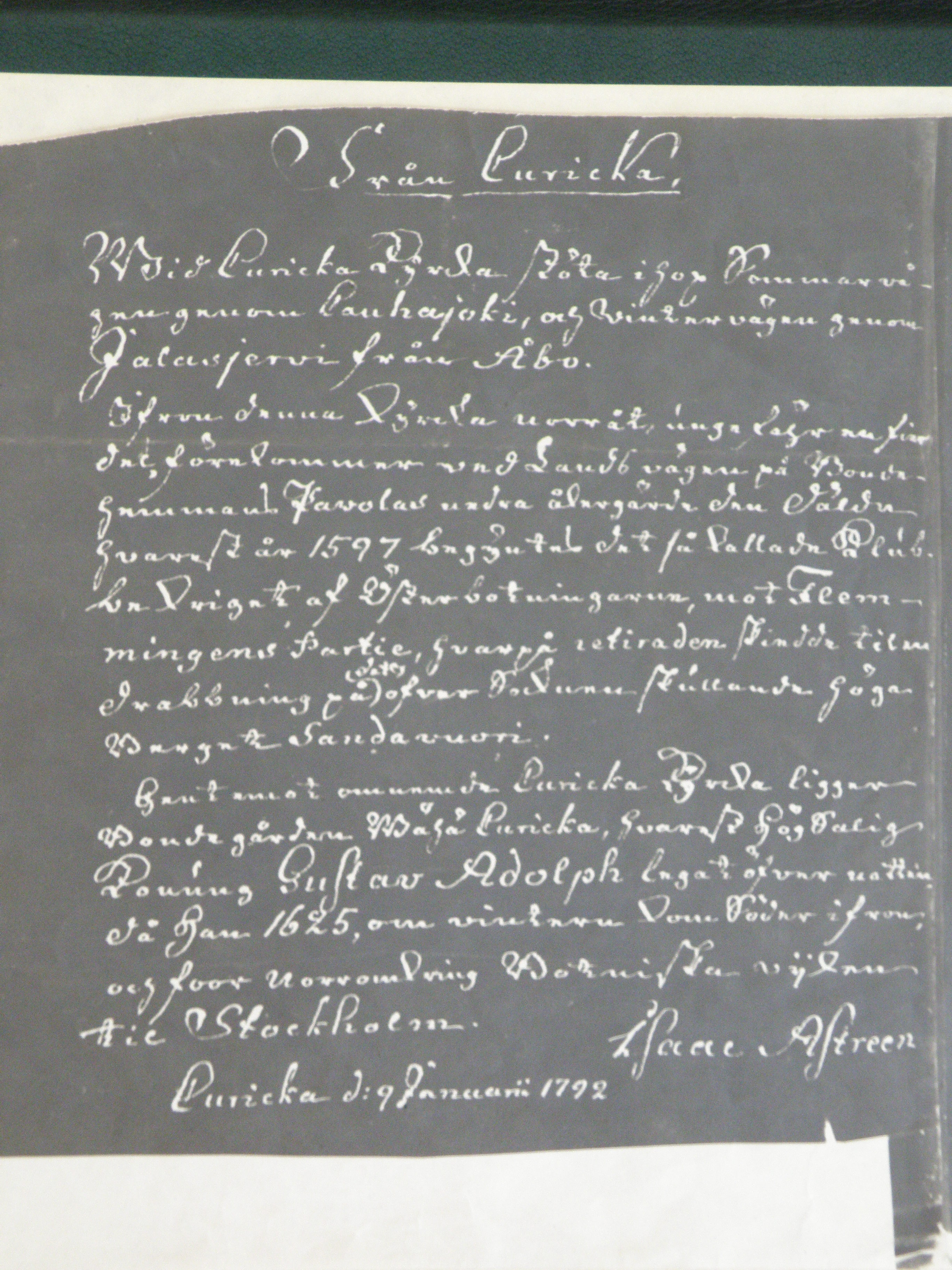 "Kurikan kirkkoa vastapäätä on Vähä-Kurikan talo, missä korkeasti autuas Kuningas Gustav Adollph on viettänyt yönsä kun hän Herran vuonna 1625 talvella tuli etelästä käsin ja matkusti pohjanlahden ympäri Tukholman kaupunkiin." Rinta-Kurikan tilan nimi oli tuohon aikaan Vähä-Kurikka ja talossa isäntänä Markus Juhonpoika Vähä-Kurikka joka oli myöhemmin käräjäsalissa lakki päässä ja nuhteet saatuaan ilmoittanut, ettei ollut riisunut lakkiaan edes Kuninkaiden ja ruhtinaiden edessä. "Kurikan historia I"